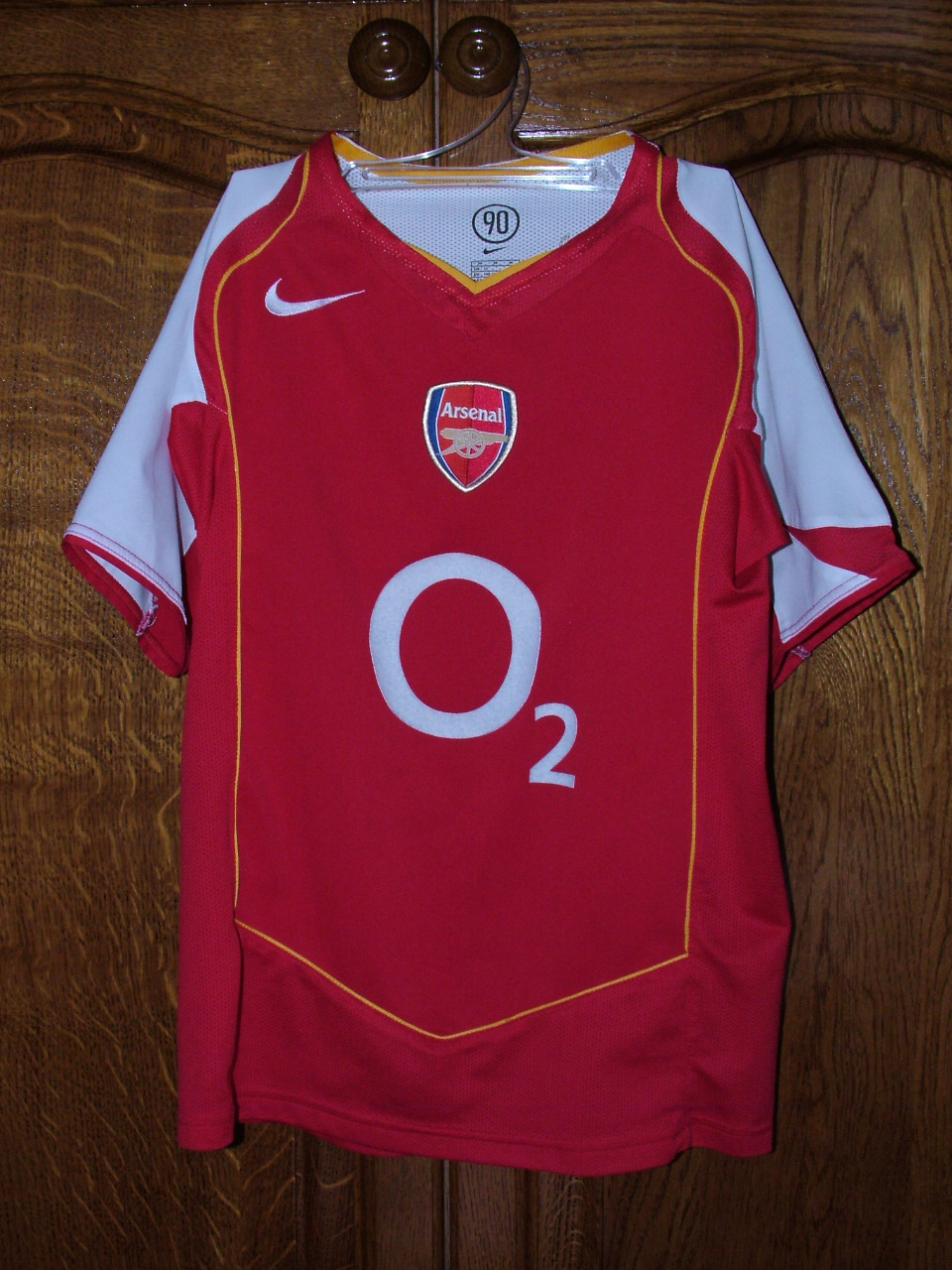 Arsenal FC home kit 2004-05